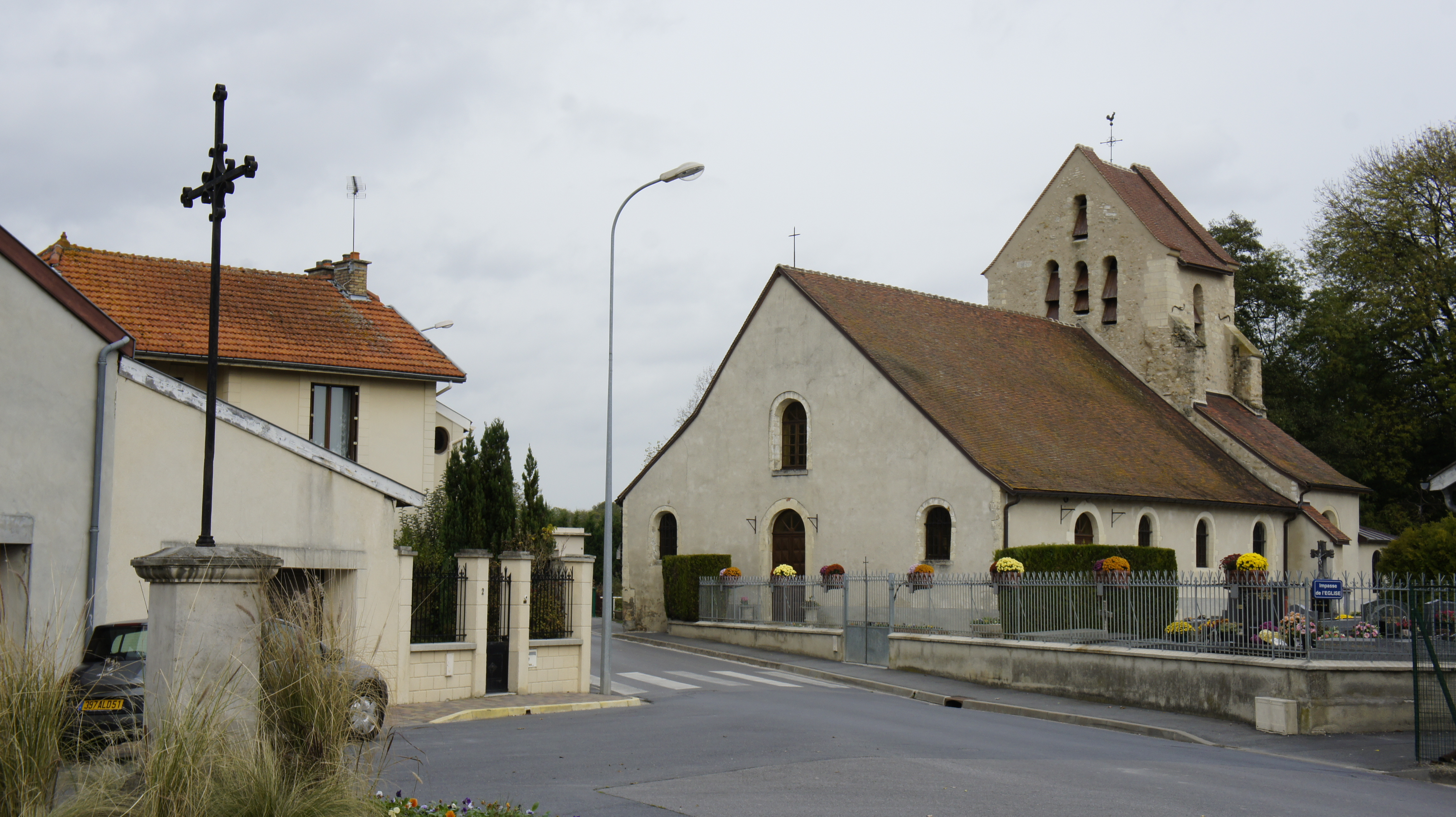 Eglise Notre-Damme de Taissy.